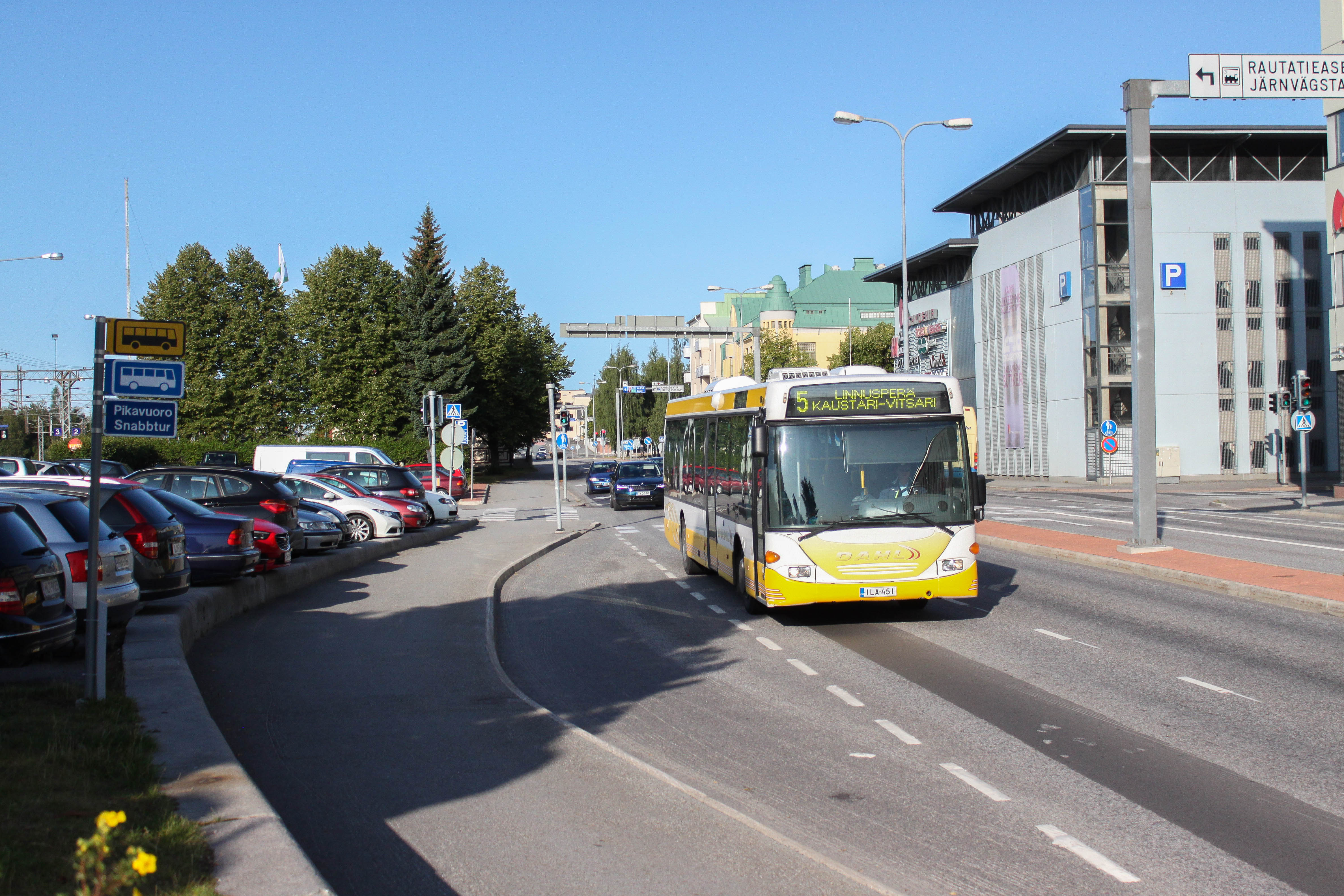 Dahl-linjaliikenteen kaupunkibussi linjalla 5 ohittaa Rautatienkadun pysäkkiä